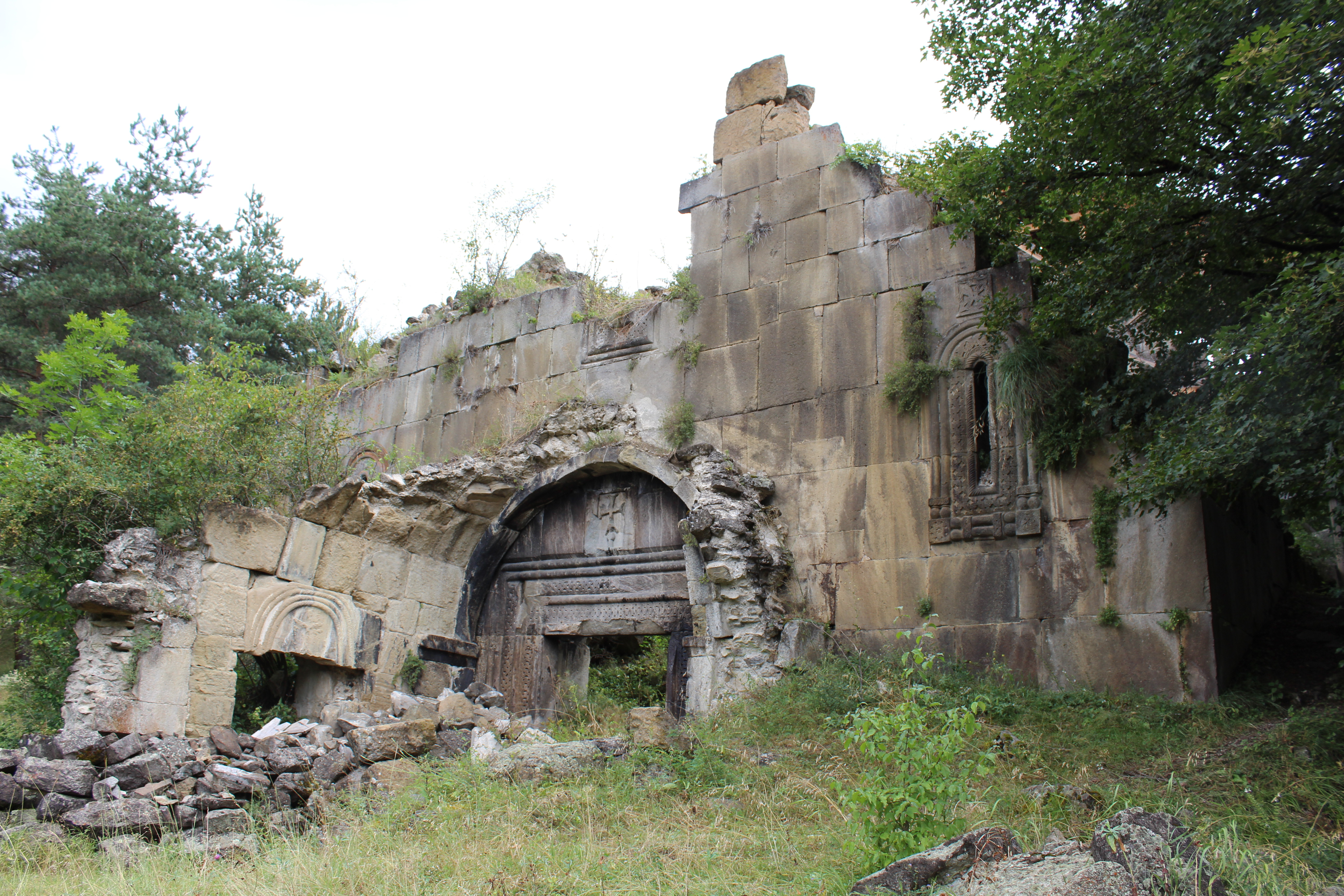 გუმბათიანი ეკლესია